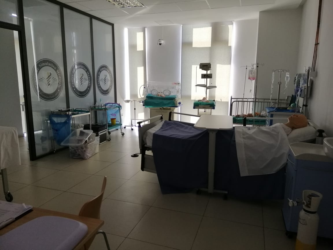 UIASS